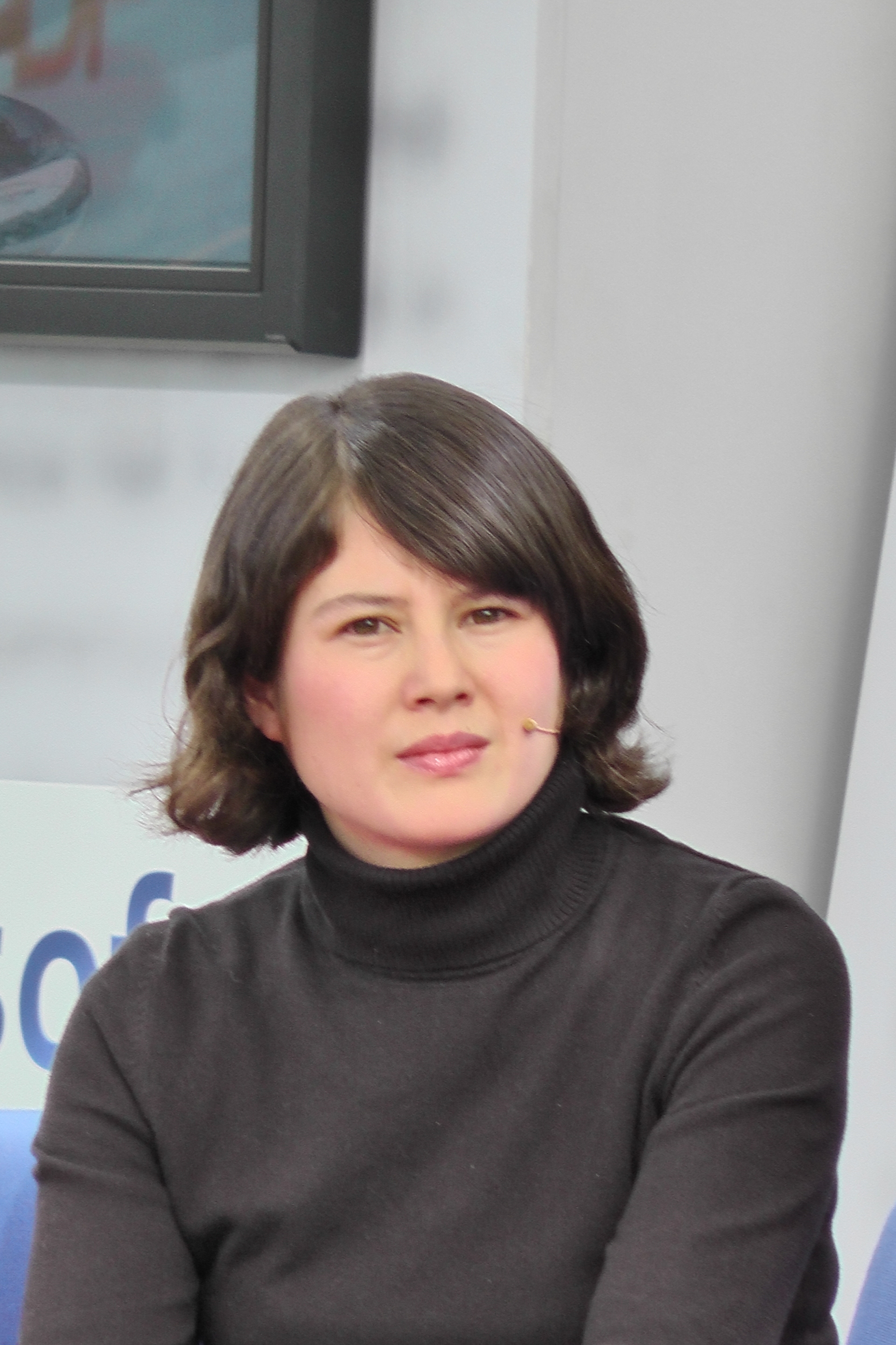 Milena Michiko Flašar